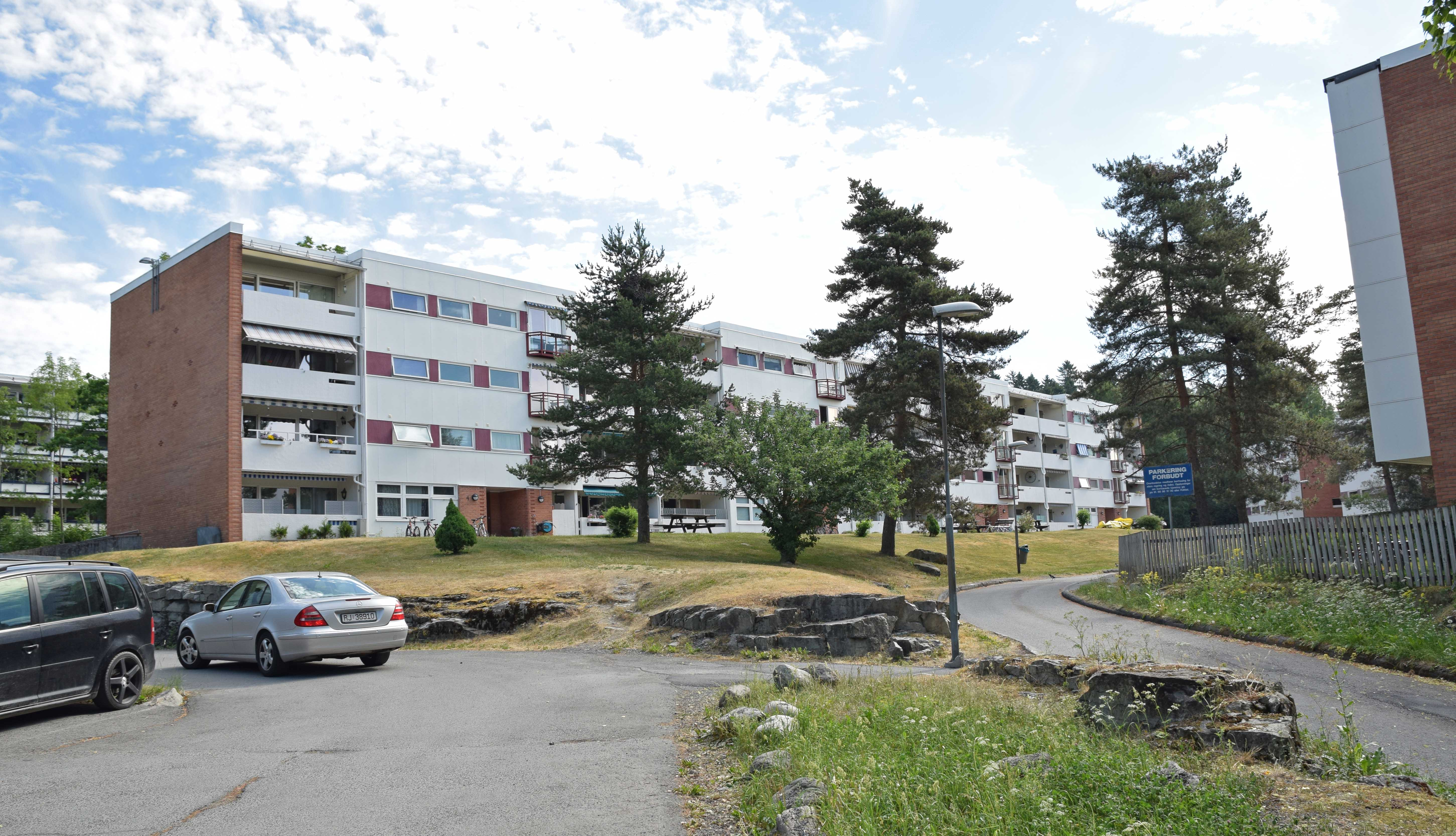 Boligblokker i Bringebærstien, Rykkinn